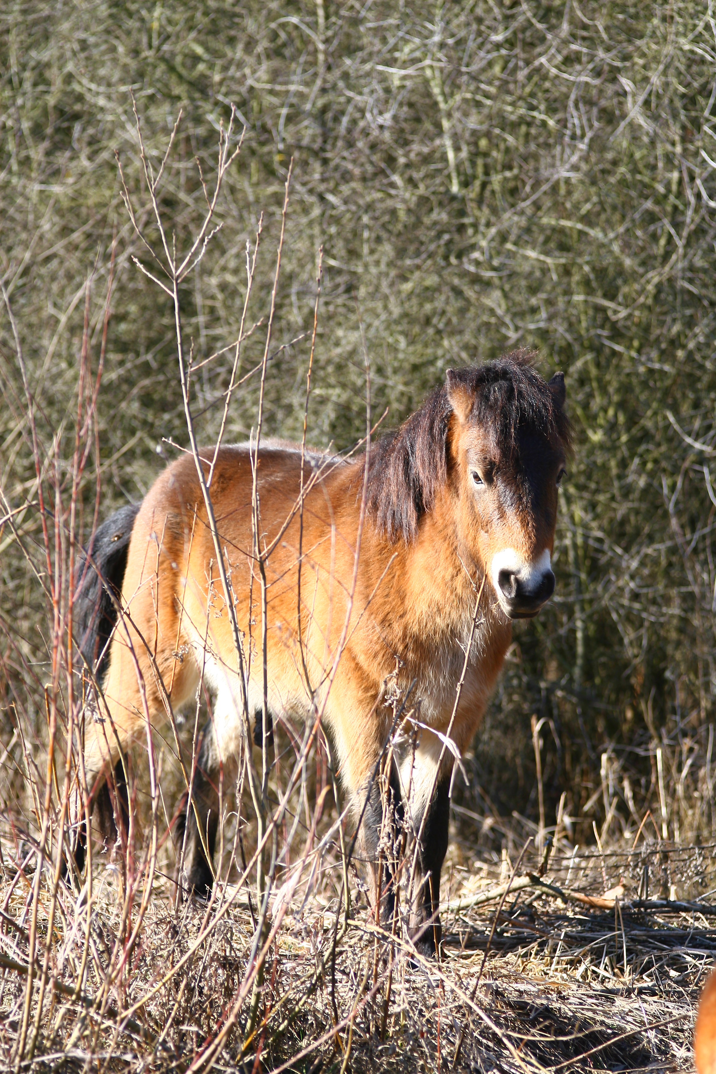 Exmoorští poníci ze stáda šesti hřebců na Šlovickém vrchu u Dobřan v EVL Dobřany.